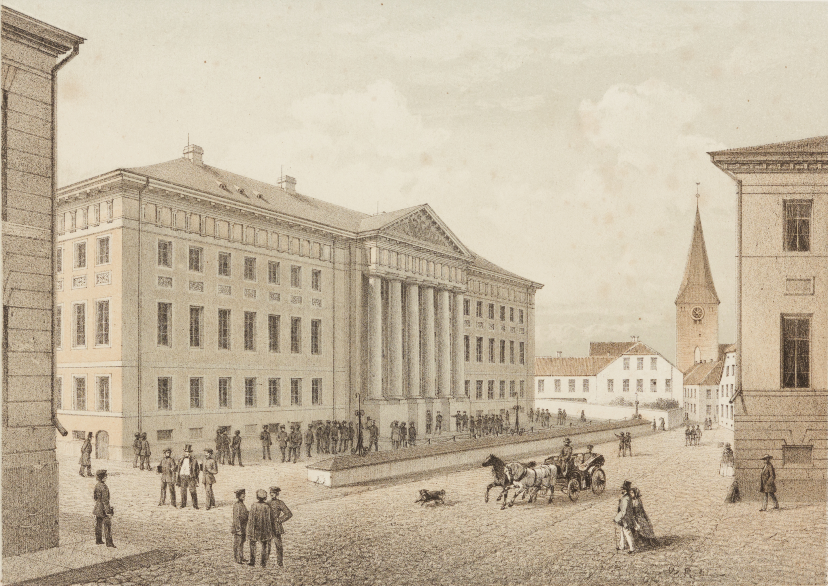 Tartu album. Ülikooli peahoone. This image on crowdsourcing geotagging platform Ajapaik MUIS: TKM TR 4038 H 31:5